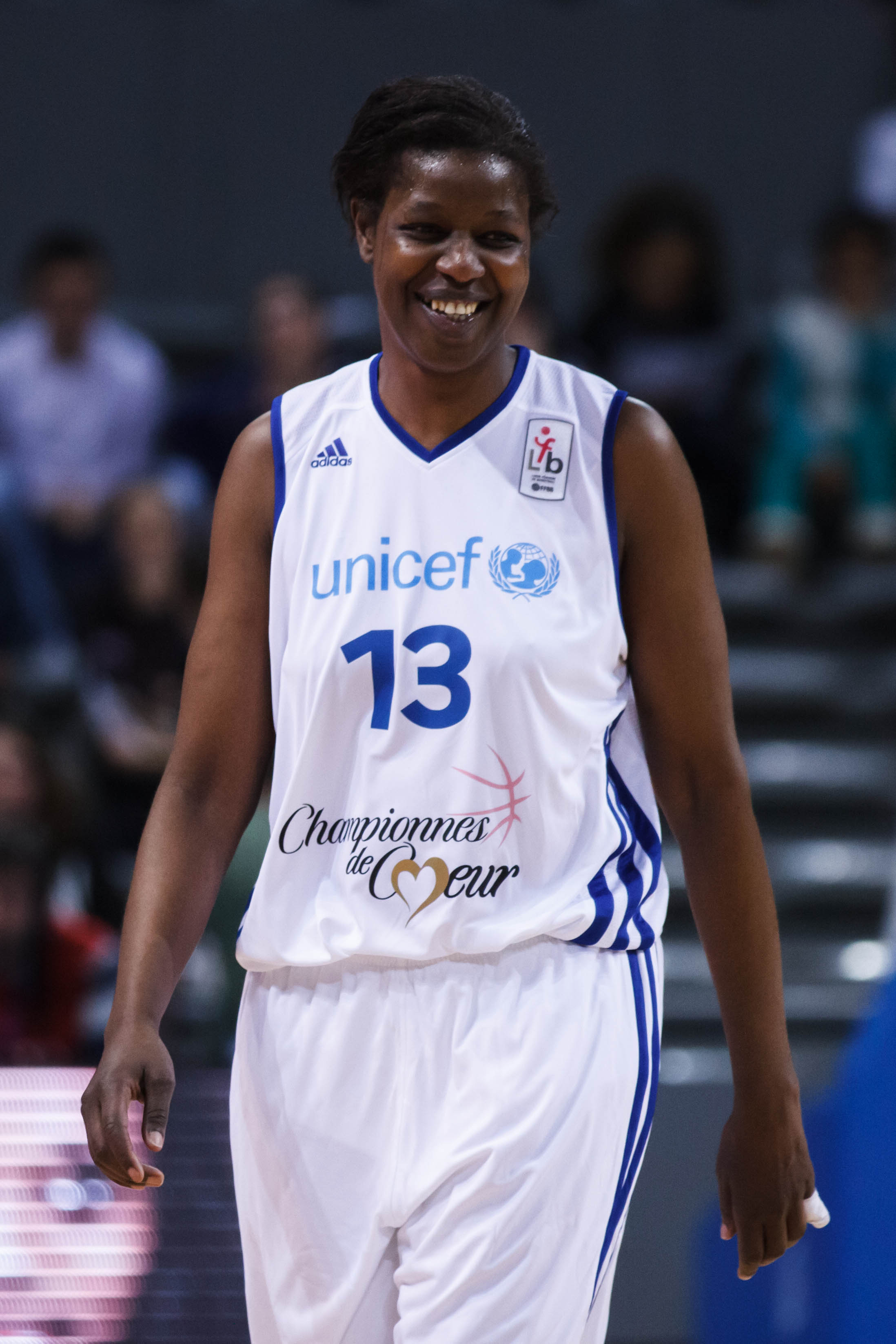 Christine Gomis, match de gala championnes de cœur